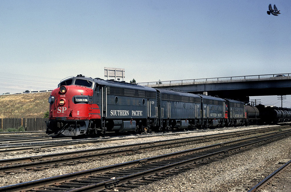 618 newhall may 66